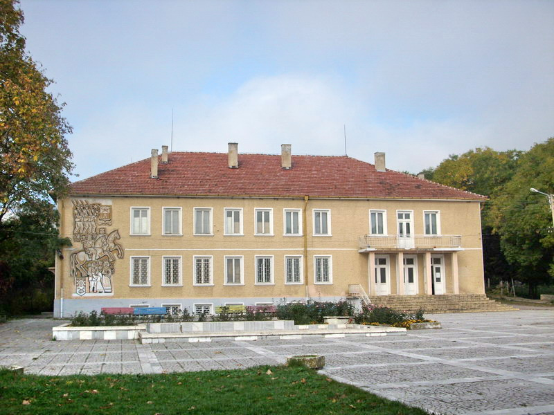 Село Зараево, община Попово. Селското народно читалище.